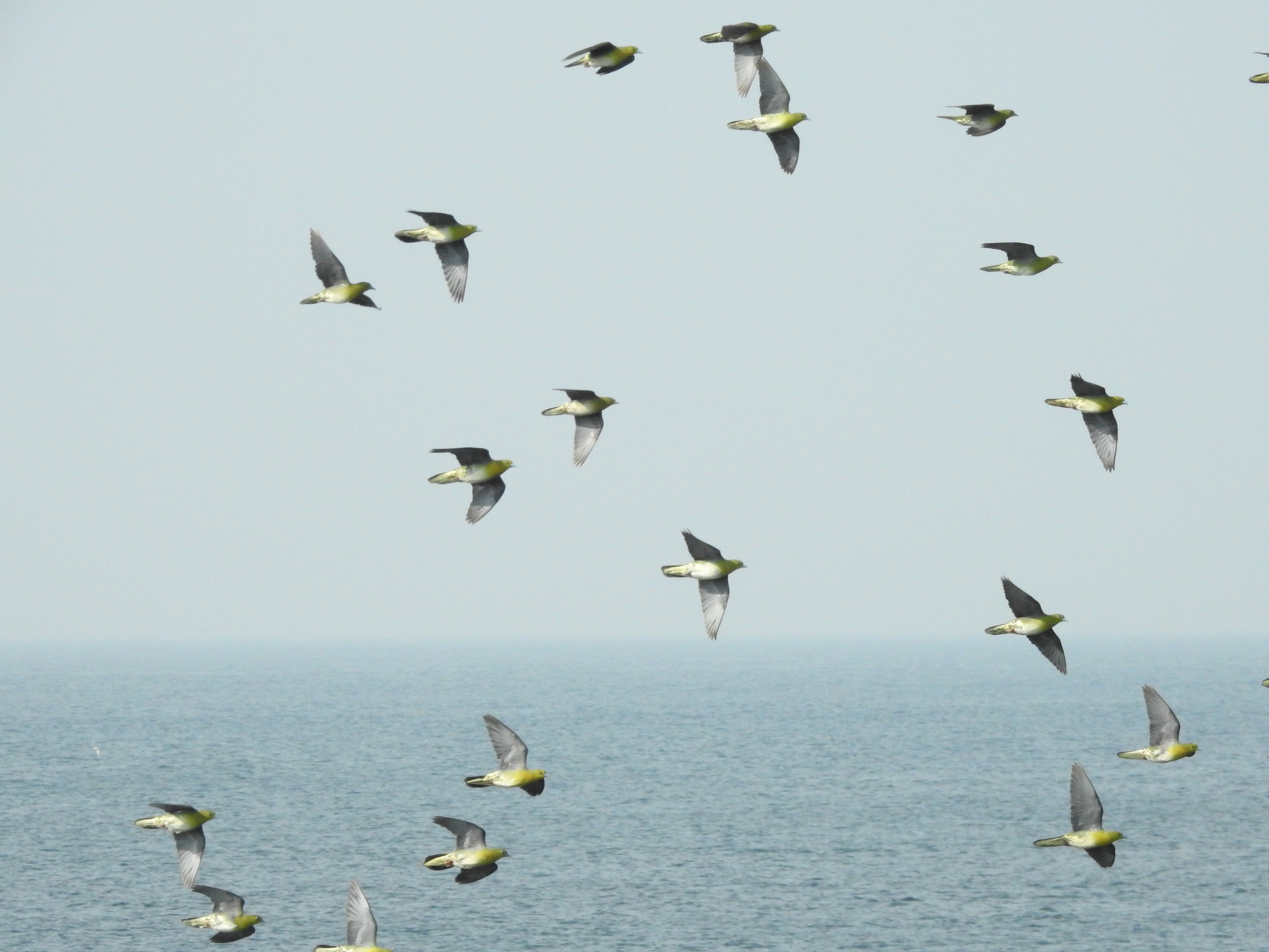 大磯町のアオバト